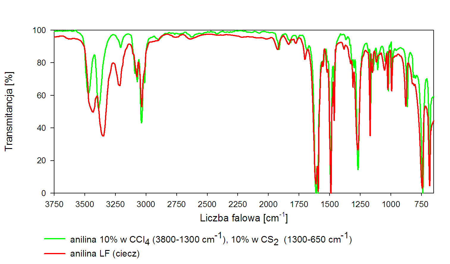 Ir spectrum